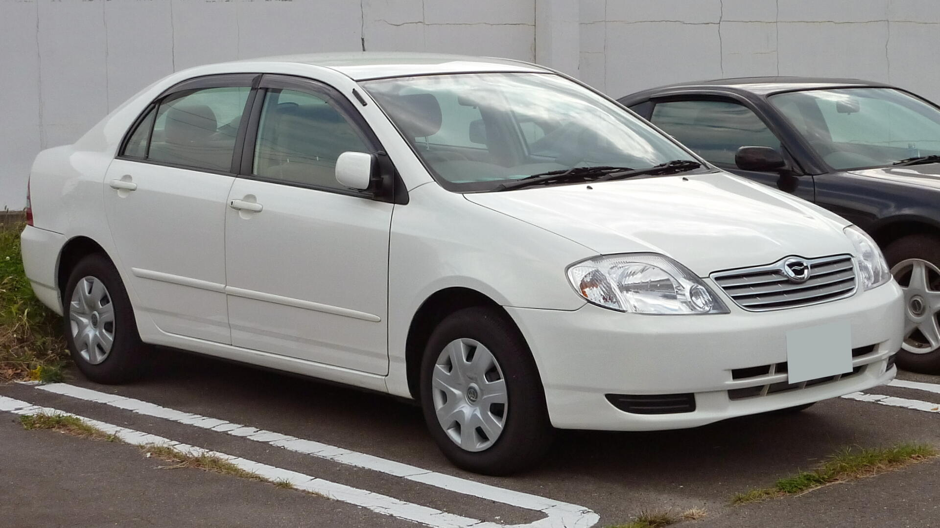 トヨタ・カローラ（E120型・中期型）